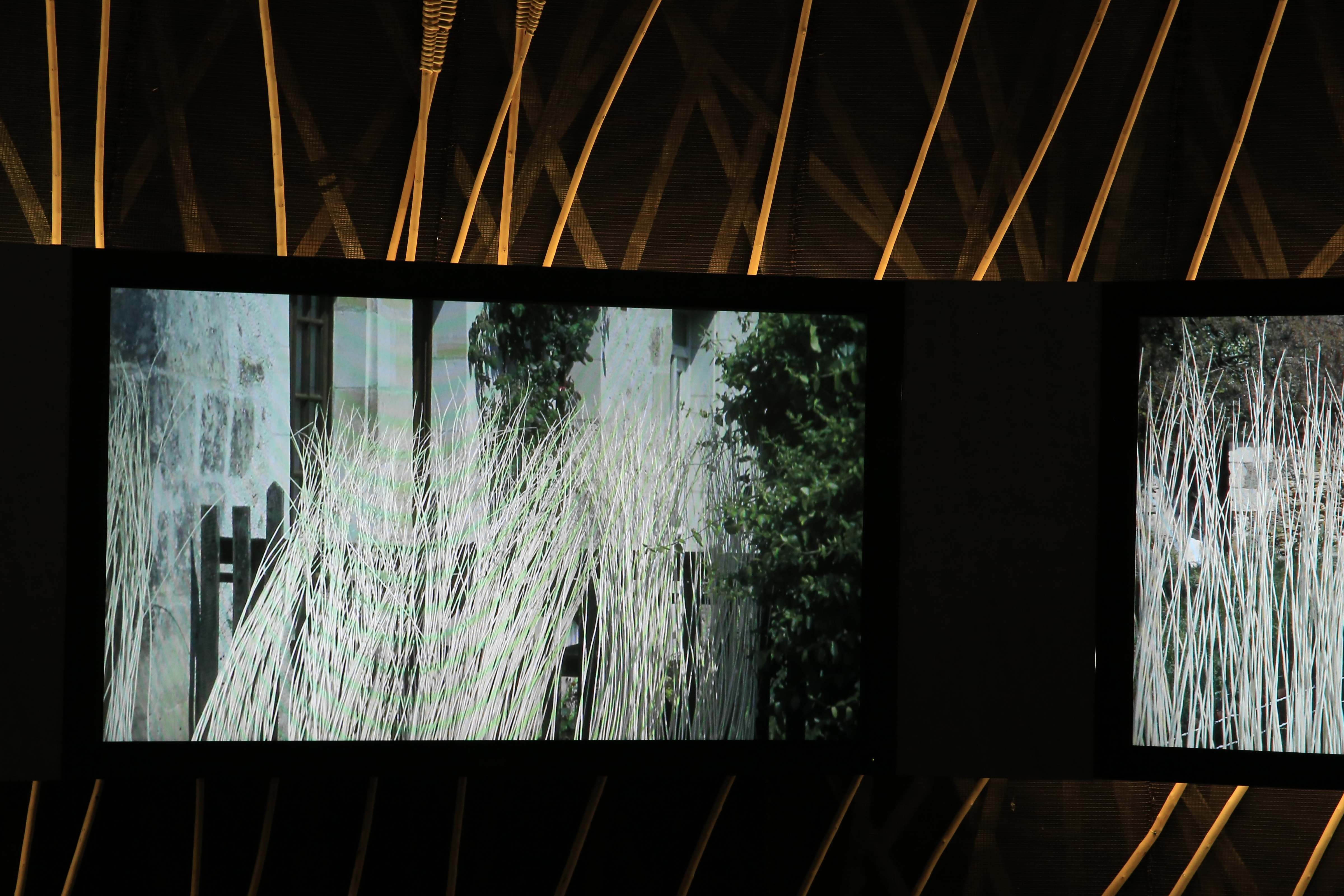 Musée de l'osier et de la vannerie à Villaines-les-Rochers, espace multimédia : l'osier mis à blanchir.